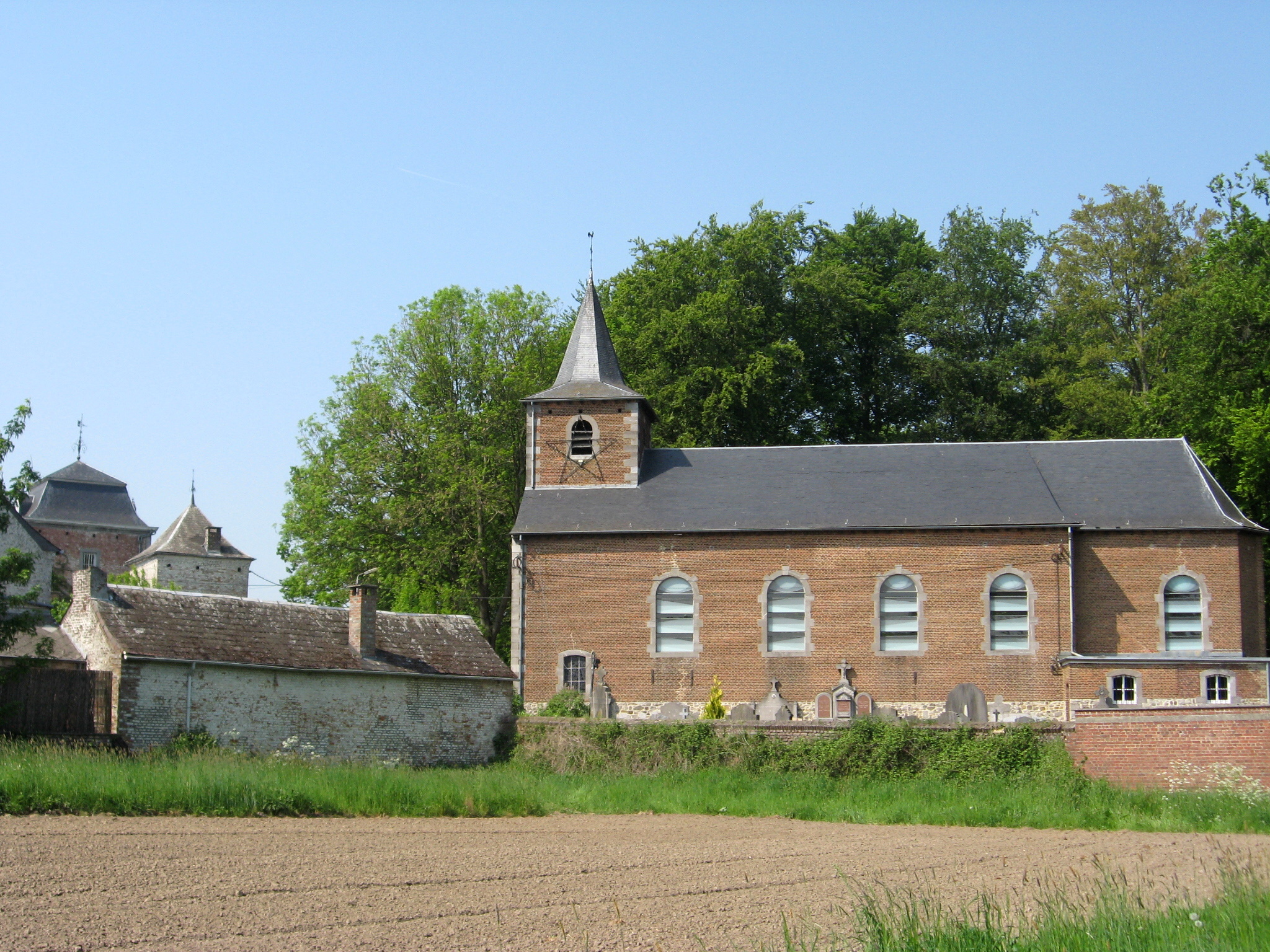 Sint-Martinuskerk in Harlue, Bolinne